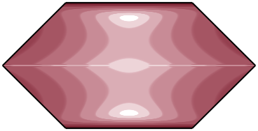 mira zkresleni